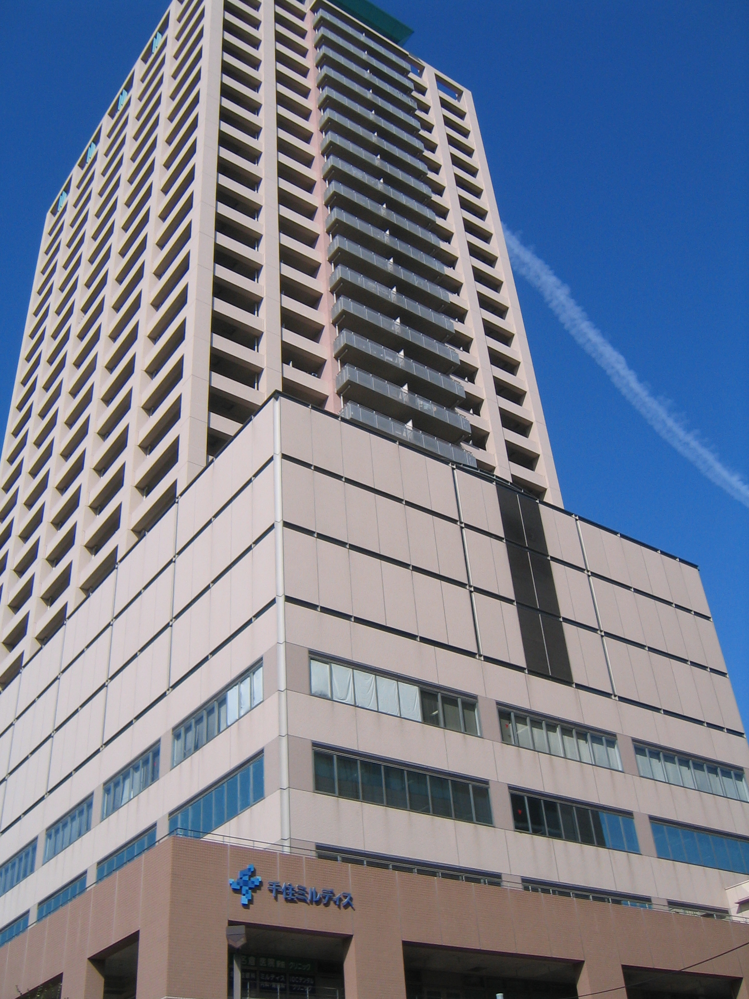 千住ミルディスＩI番館。東京都足立区千住3-92。アトラスタワー北千住、ミルディスメディカルフロアなど